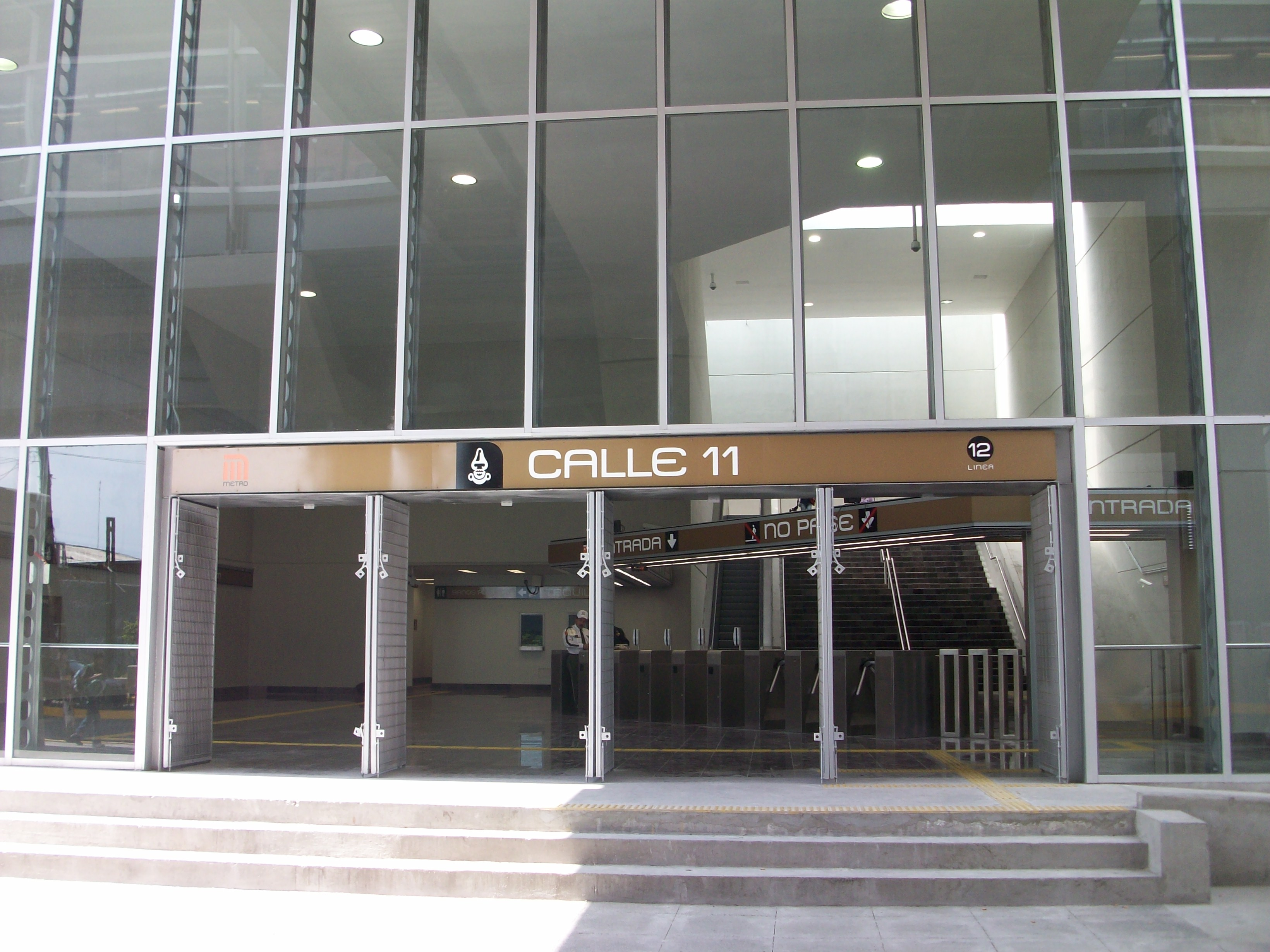 Acceso a la estacion